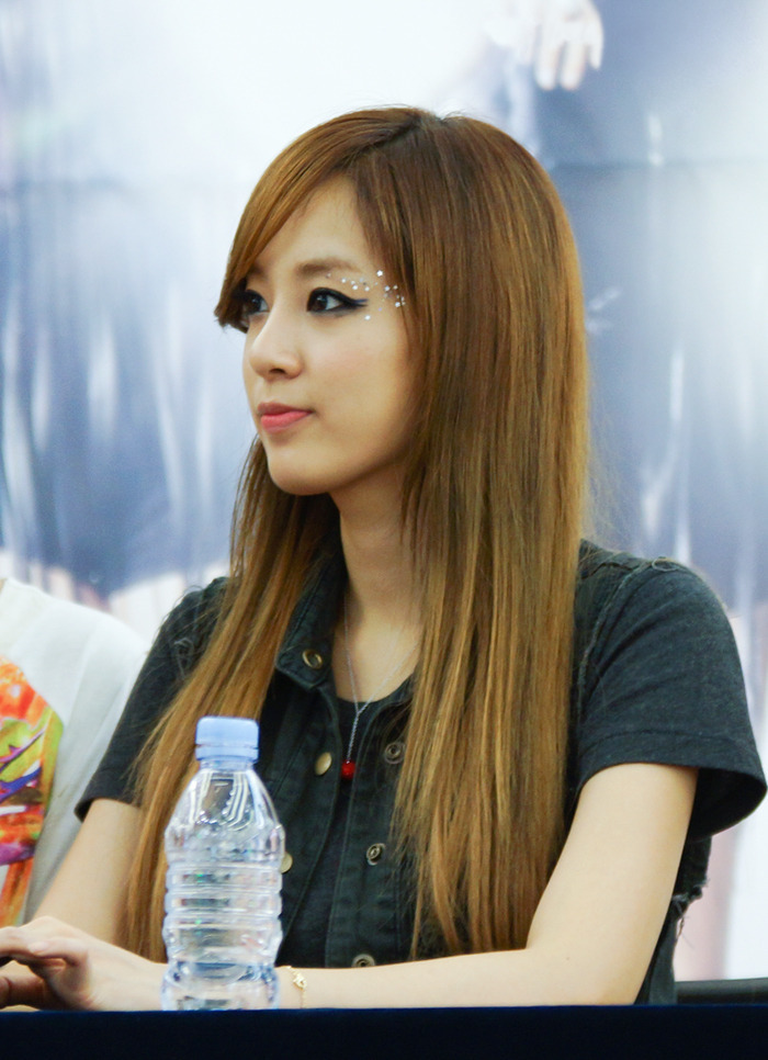 2012년 7월 1일 영등포 타임스퀘어 핫트랙스 팬사인회에서.